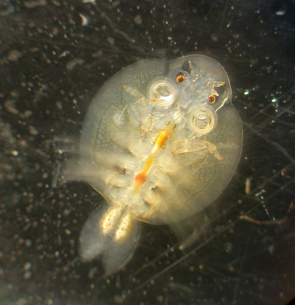 Argulus coregoni ：チョウモドキ 2004/11/20 和歌山県田辺市：Tanabe City. Wakayama Pref. Japan